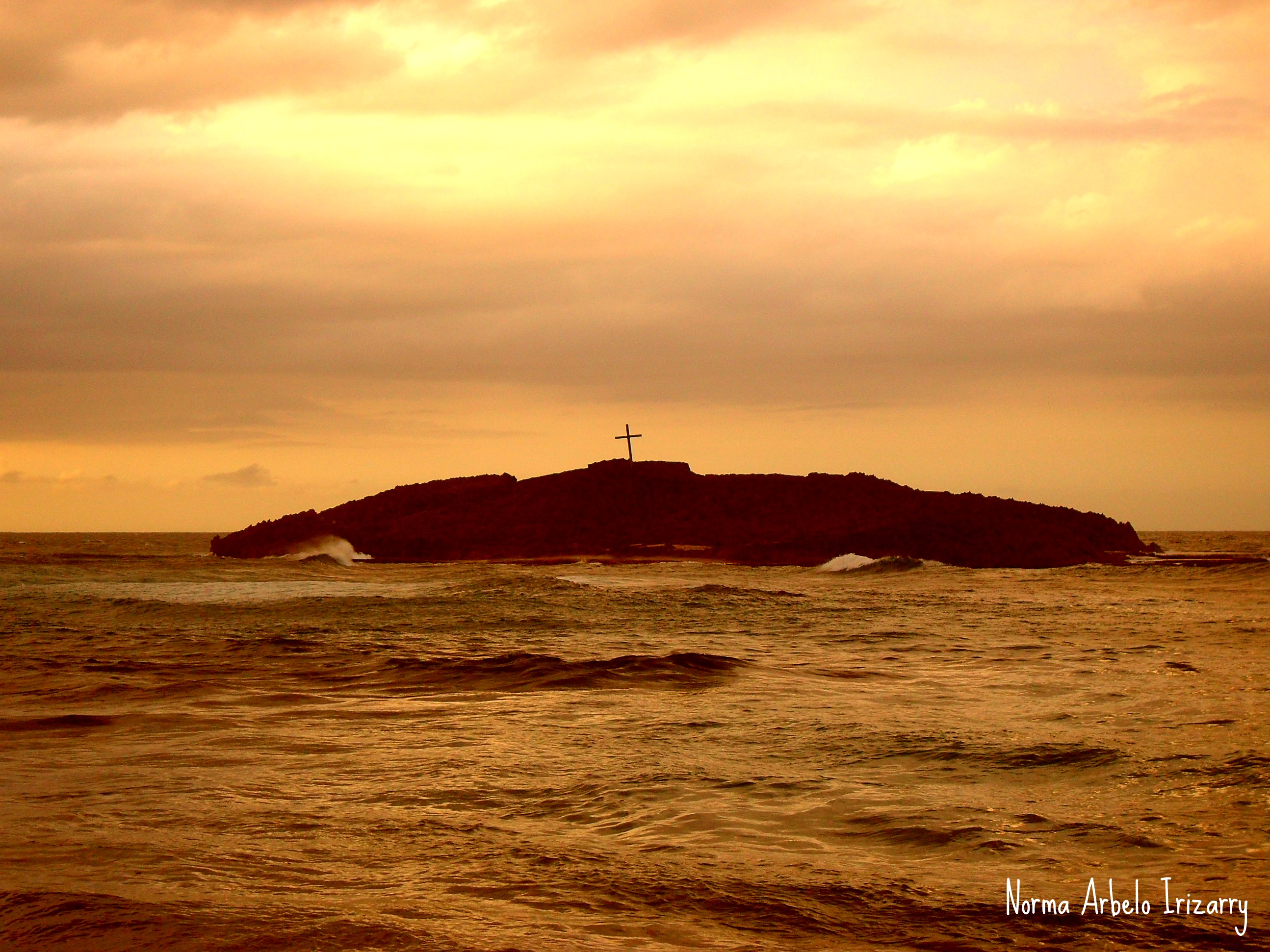 Atardecer en el Peñon de los Amadores - Camuy, Puerto Rico